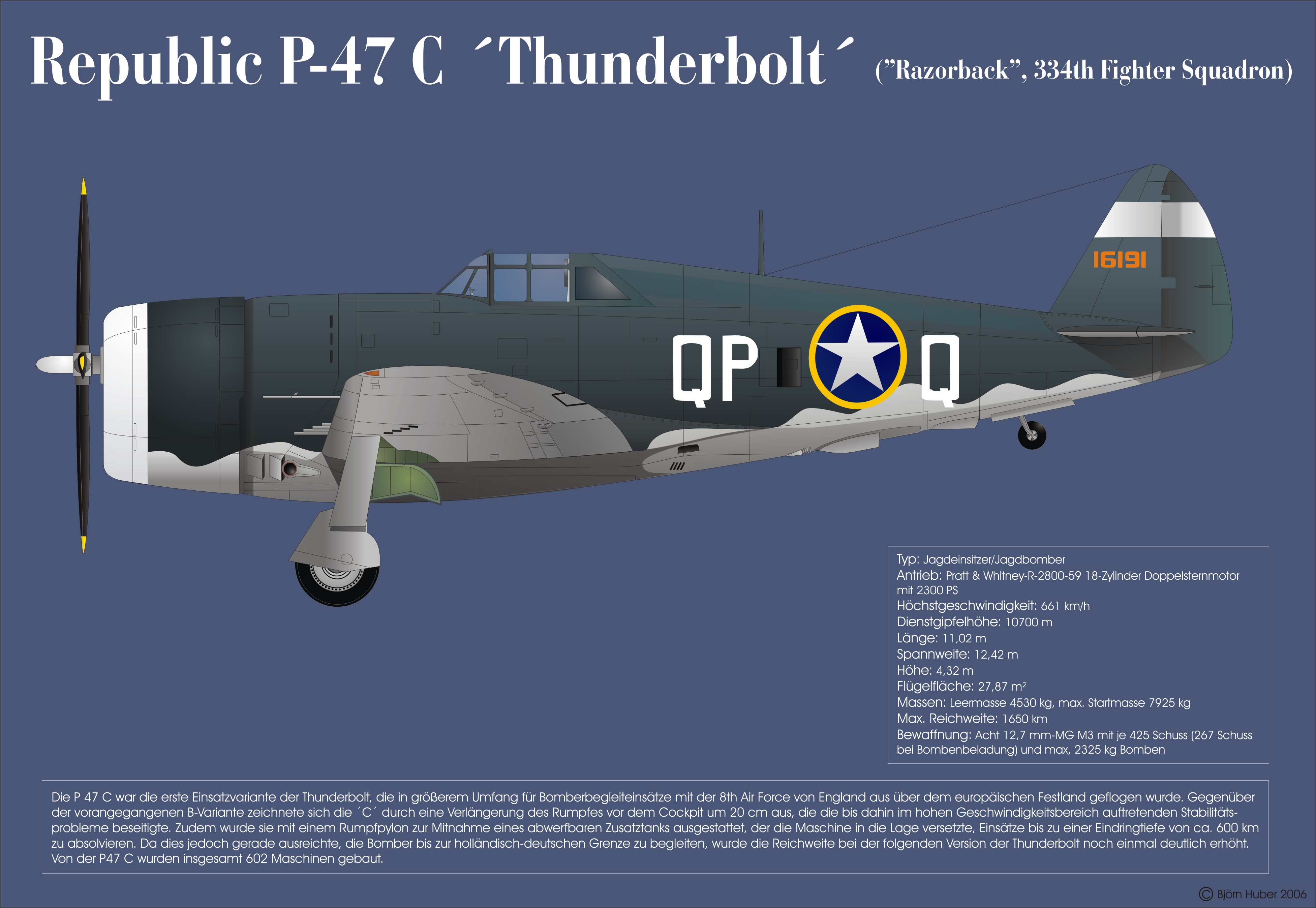 Bildbeschreibung: P 47 C "Razorback" Quelle: Selbsterstellte Grafik Zeichner: Björn Huber Datum: April 2006 Sonstiges: GNU-Lizenziert